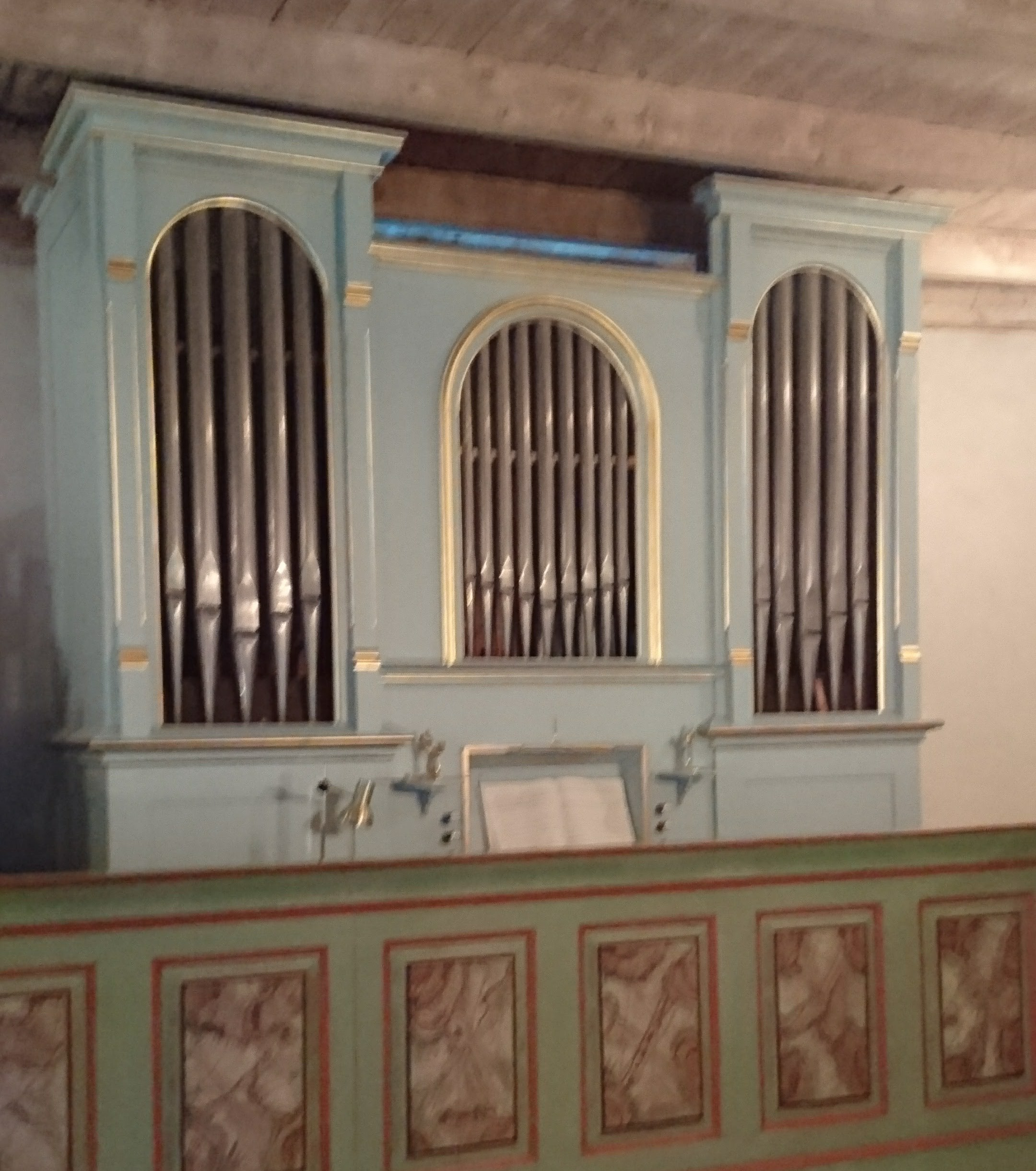 Eriksensorgelet i Gildeskål gamle kirke